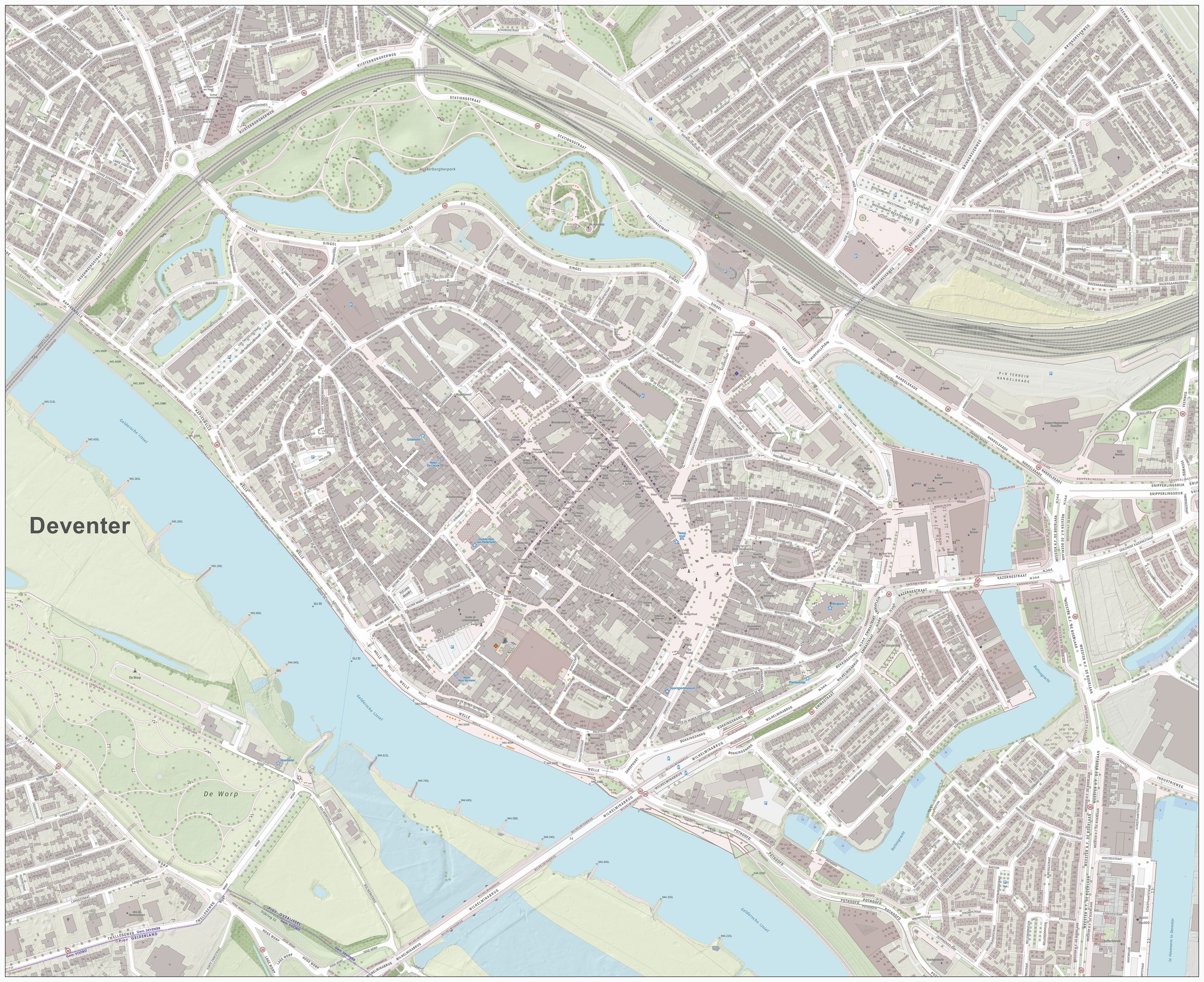 Topografische kaart van Deventer (centrum van woonplaats). Resolutie: 2688 pixels/km. Kaartbeeld samengesteld uit de open geodata van de Basisregistratie Grootschalige Topografie (BGT), Creative Commons-BY Kadaster, en Top10NL en Top25namen (Basisregistratie Topografie, Kadaster), Creative Commons-BY Kadaster. Gebouwvlakken uit open geodata BAG extract, Creative Commons-BY Kadaster. Wegen uit de OpenStreetMap, CC-BY OpenStreetMap bijdragers. Reliëfschaduw uit de Actuele Hoogtekaart AHN2/AHN3. Samenstelling en kleurenschema: Jan-Willem van Aalst, met QGIS2. Zie ook de Legenda.